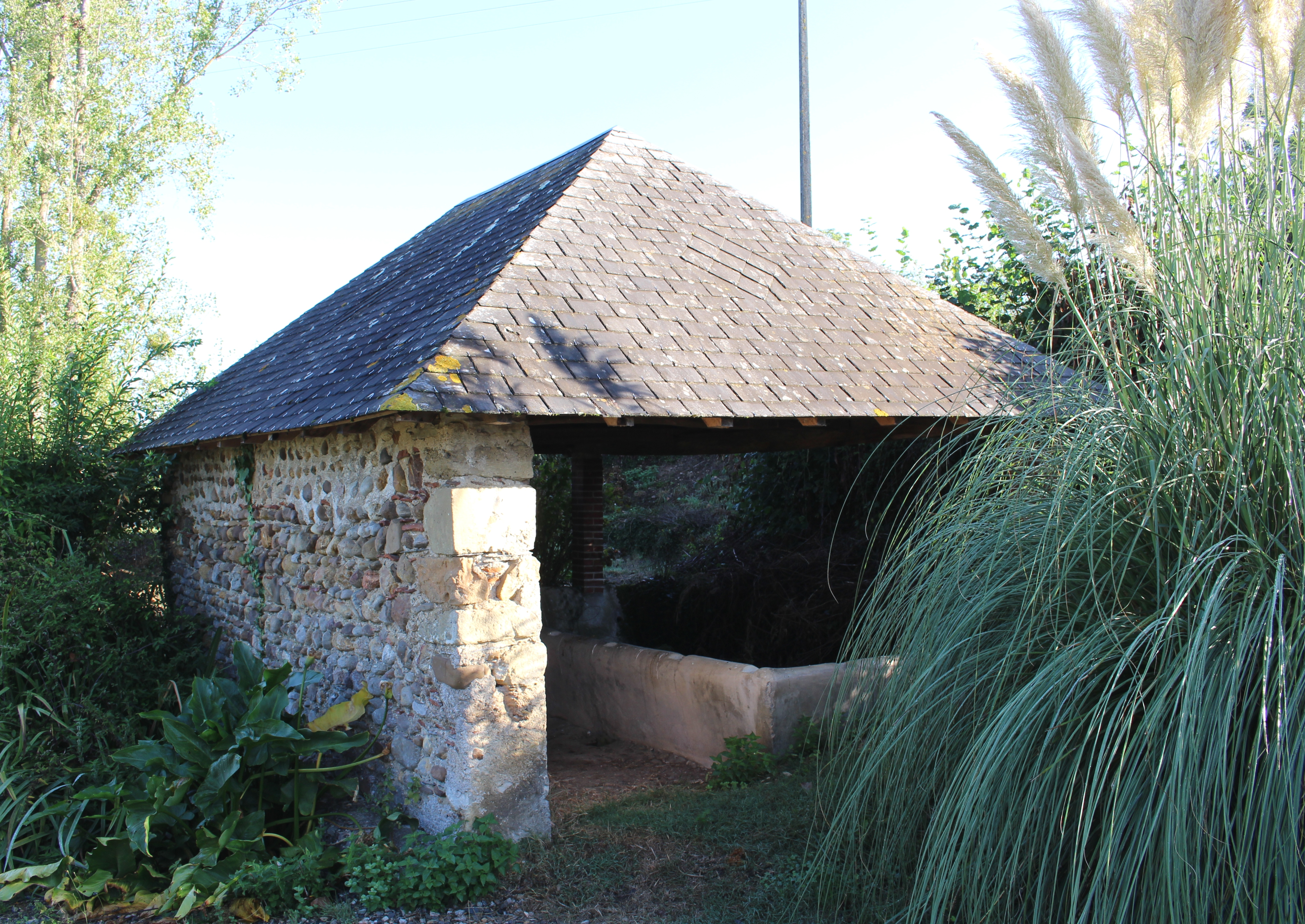 Lavoir de Clarac (Hautes-Pyrénées)